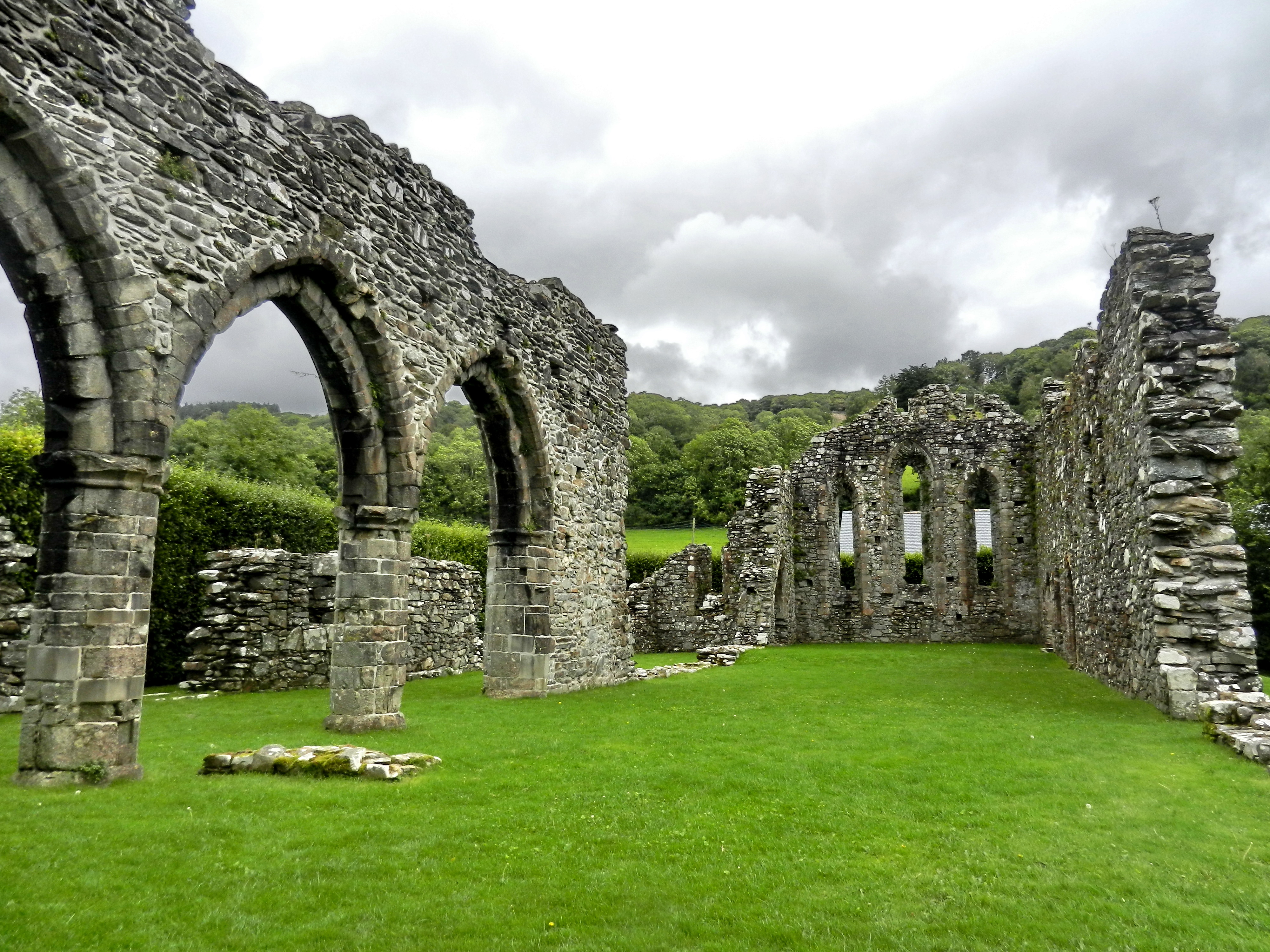 Abaty Cymer Abbey